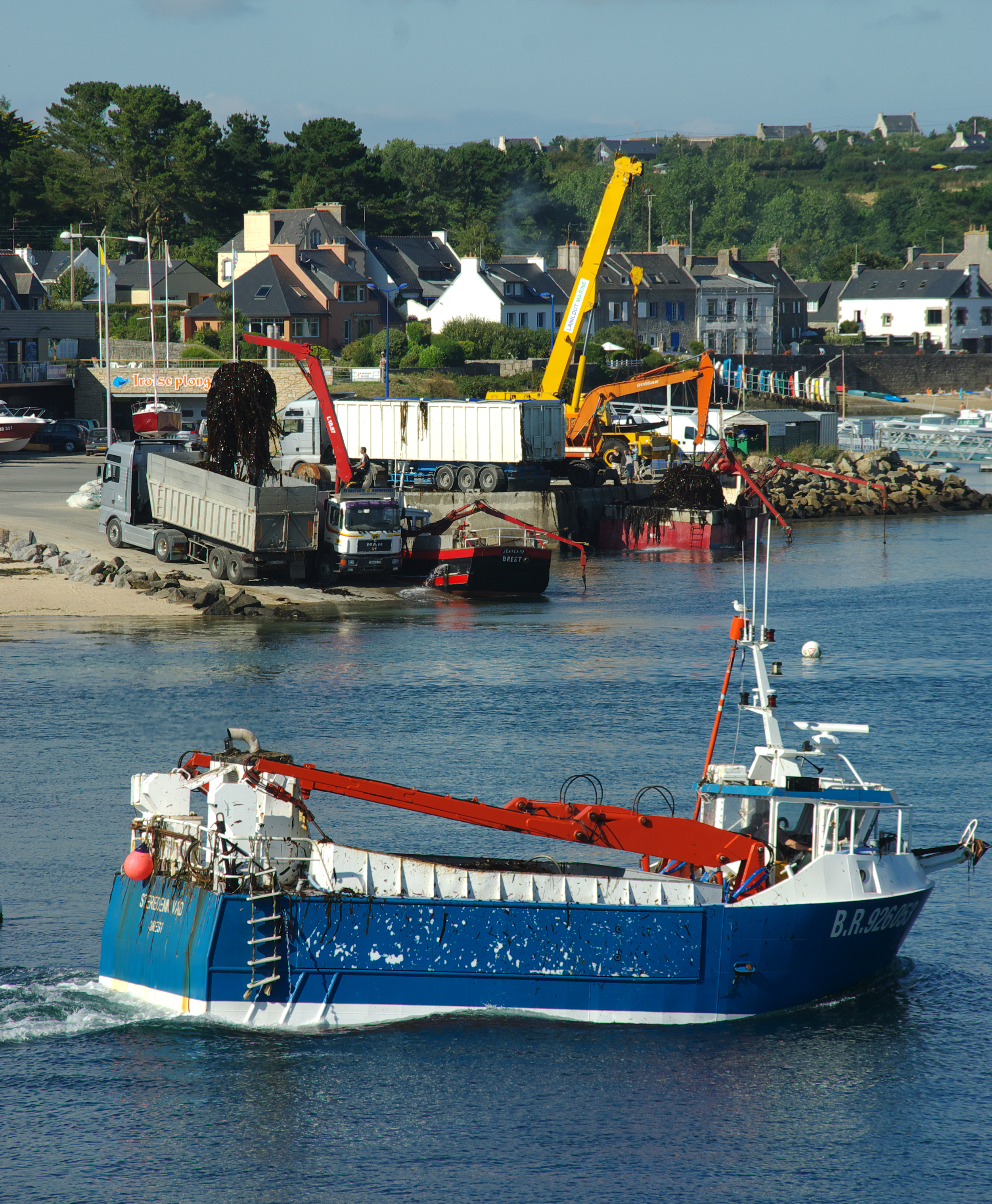 Un goemonier rentre dans l'Aber Ildut, alors que deux autres goemoniers sont en train de débarquer leur cargaison d'algues